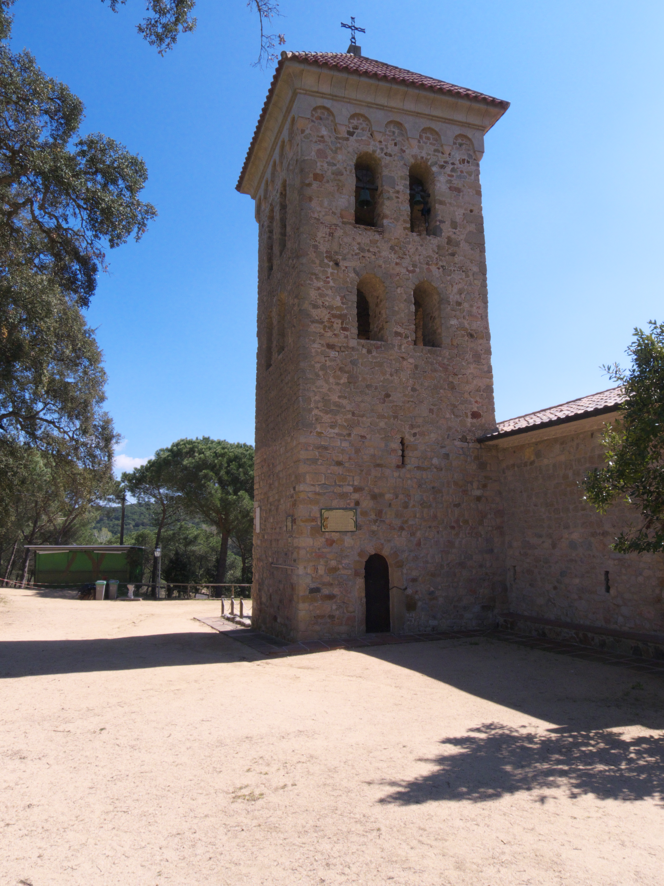 Campanario de la primera iglesia de Lloret de Mar